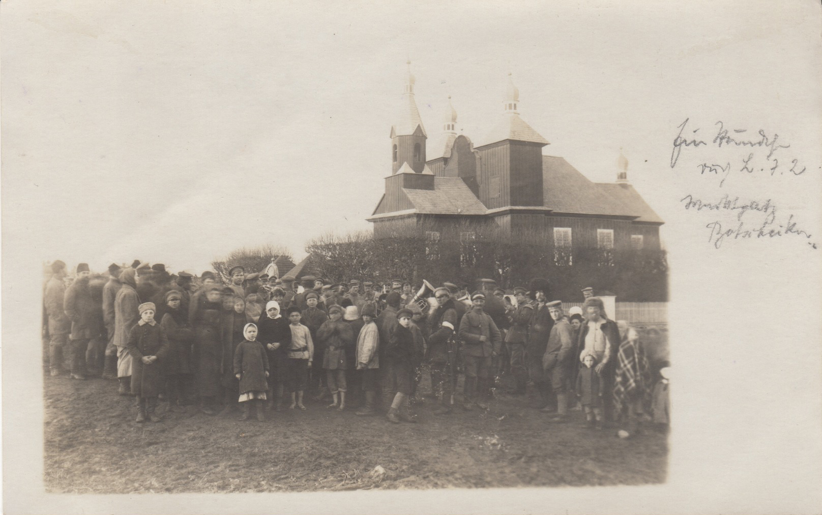 Беларуская (тарашкевіца): Бачэйкаў (Bačejkaŭ), пляц Рынак (plac Rynak). Царква